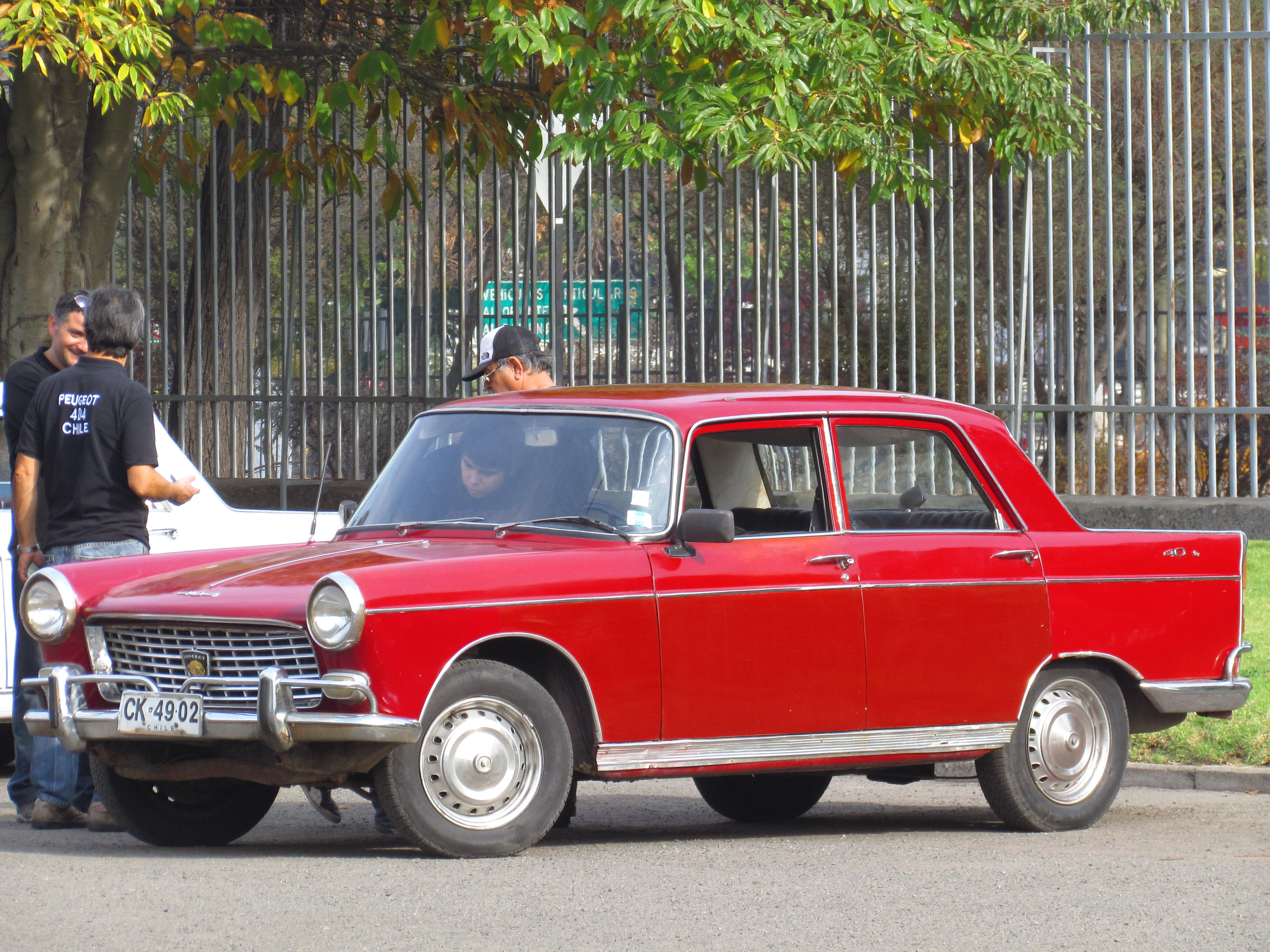 Peugeot 404 1971